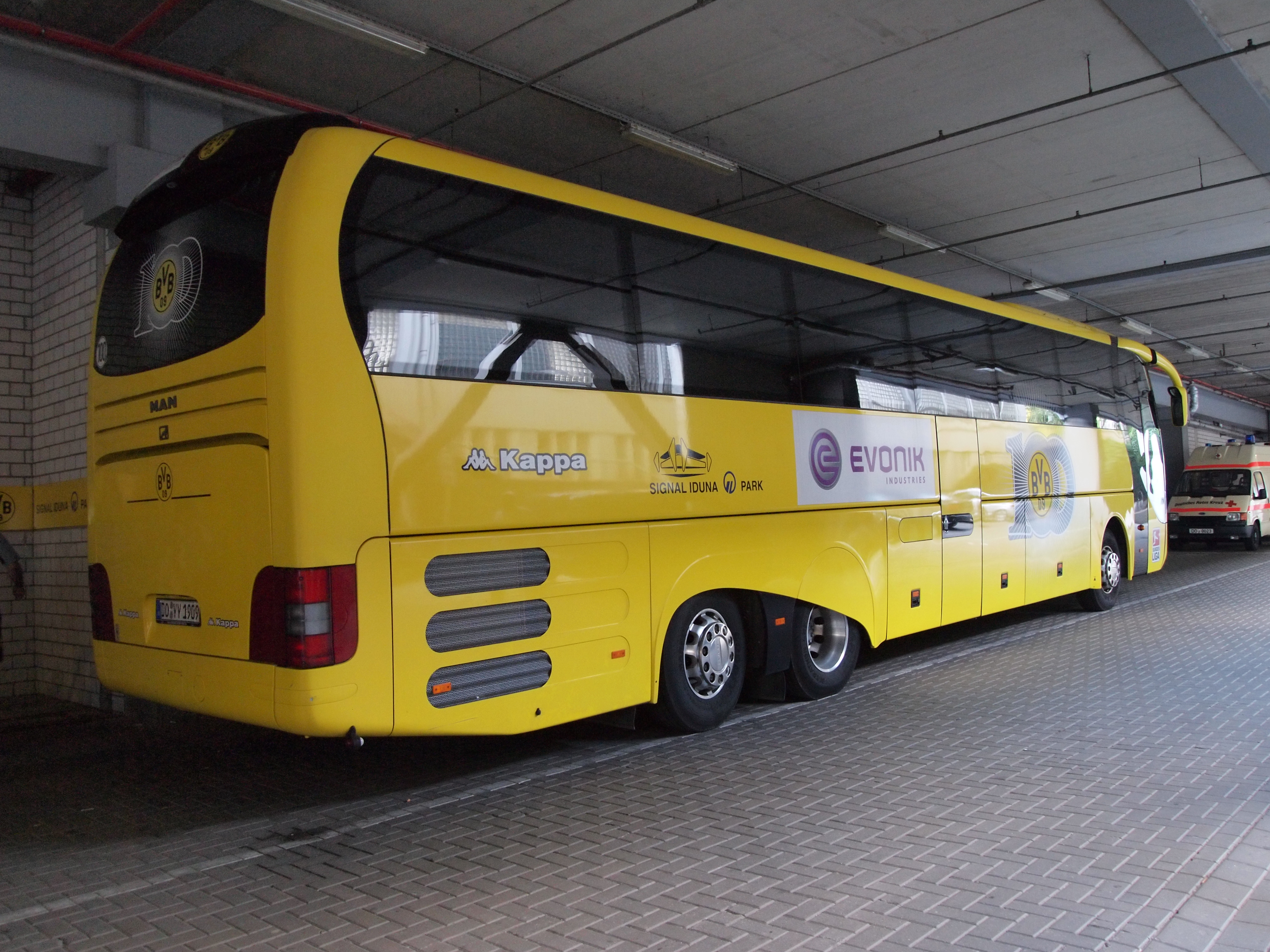 Vereinsbus des BVB 09 bis zum Ende der Saison 2009/2010